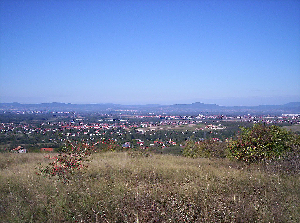 Somlyó-hegy, Fót